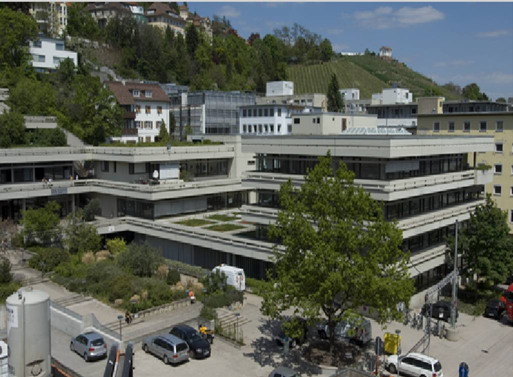 BA Stuttgart Hauptgebäude Jägerstraße